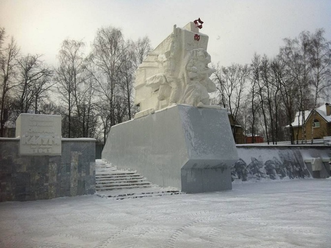 Мемориальный комплекс «Освобождение Калуги от фашистских захватчиков 30.12.1941 г.» , 1981 г. Автор - М.Л. Сковородин.